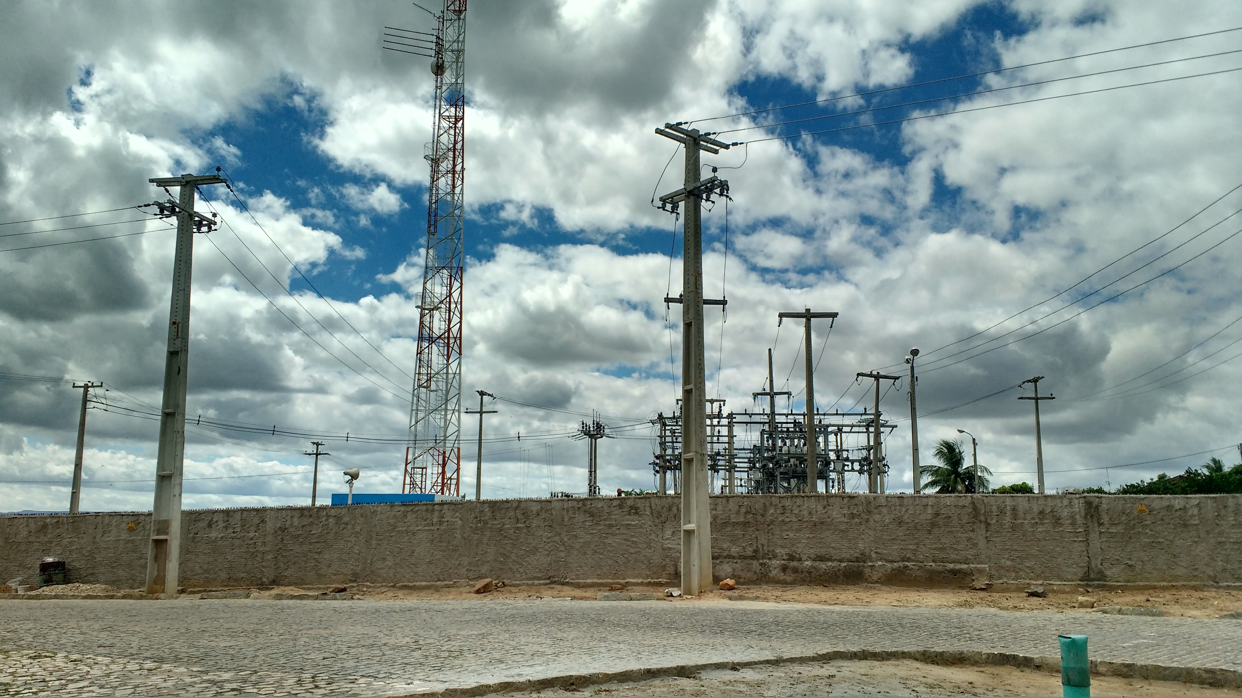 Subestação de energia elétrica de Marcelino Vieira, Rio Grande do Norte (Brasil).